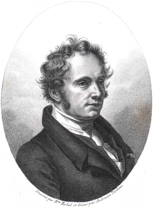 Charles-François Brisseau-Mirbel (1776-1854), French botanist.